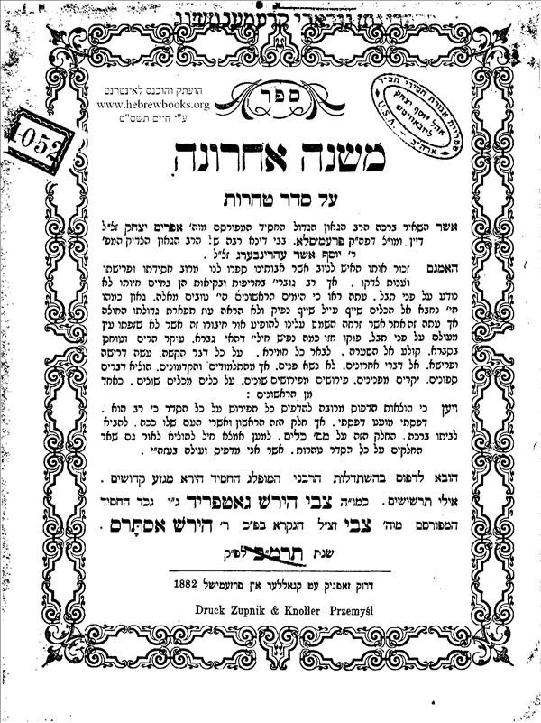 ספר משנה אחרונה על ששה סדרי משנה